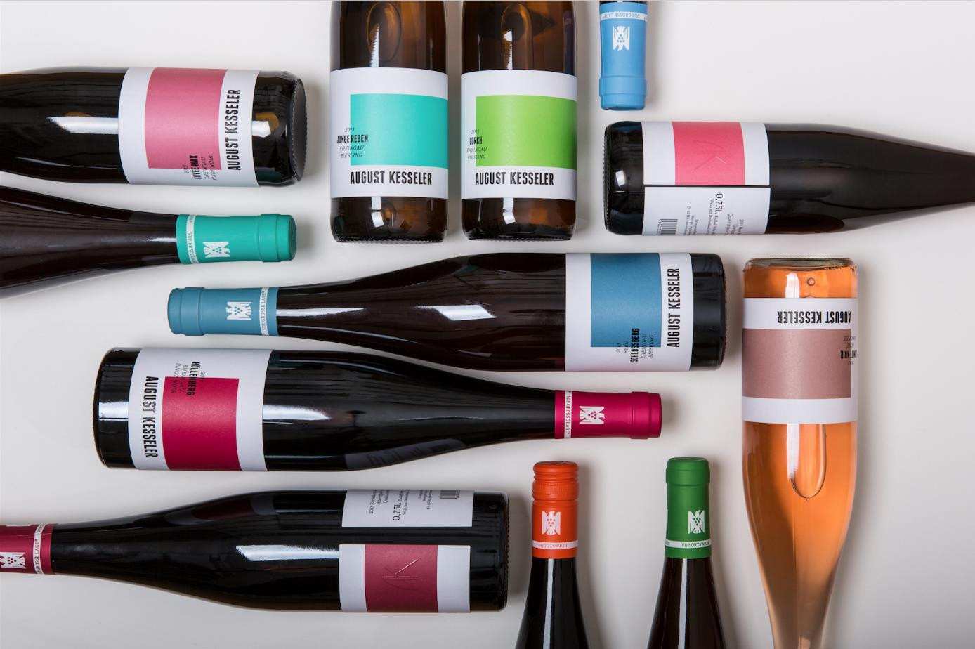 Unsere Weine, Weingut August Kesseler